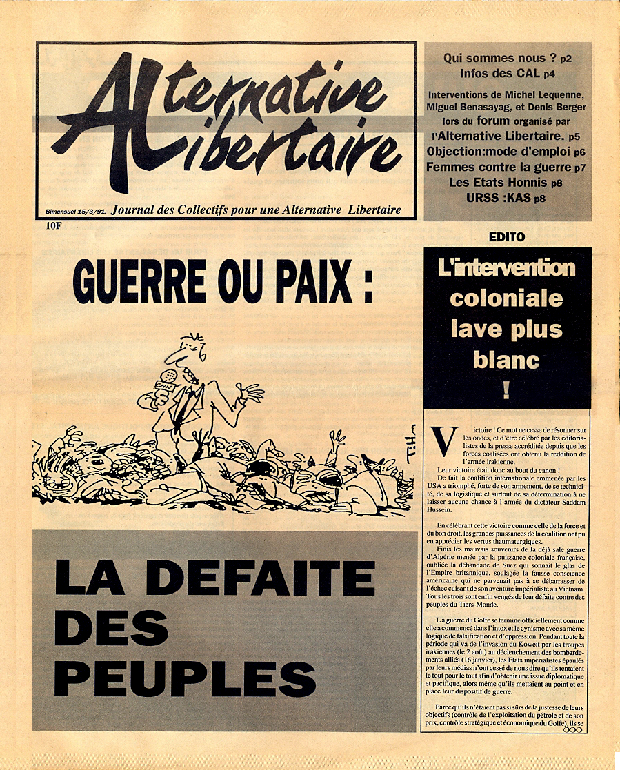 Premier numéro du mensuel Alternative libertaire, en mars 1991, au moment de la guerre du Golfe.